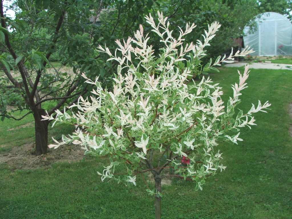 Salix integra `Hakuro Nishiki` (pl. wierzba zwarta, wierzba japońska)